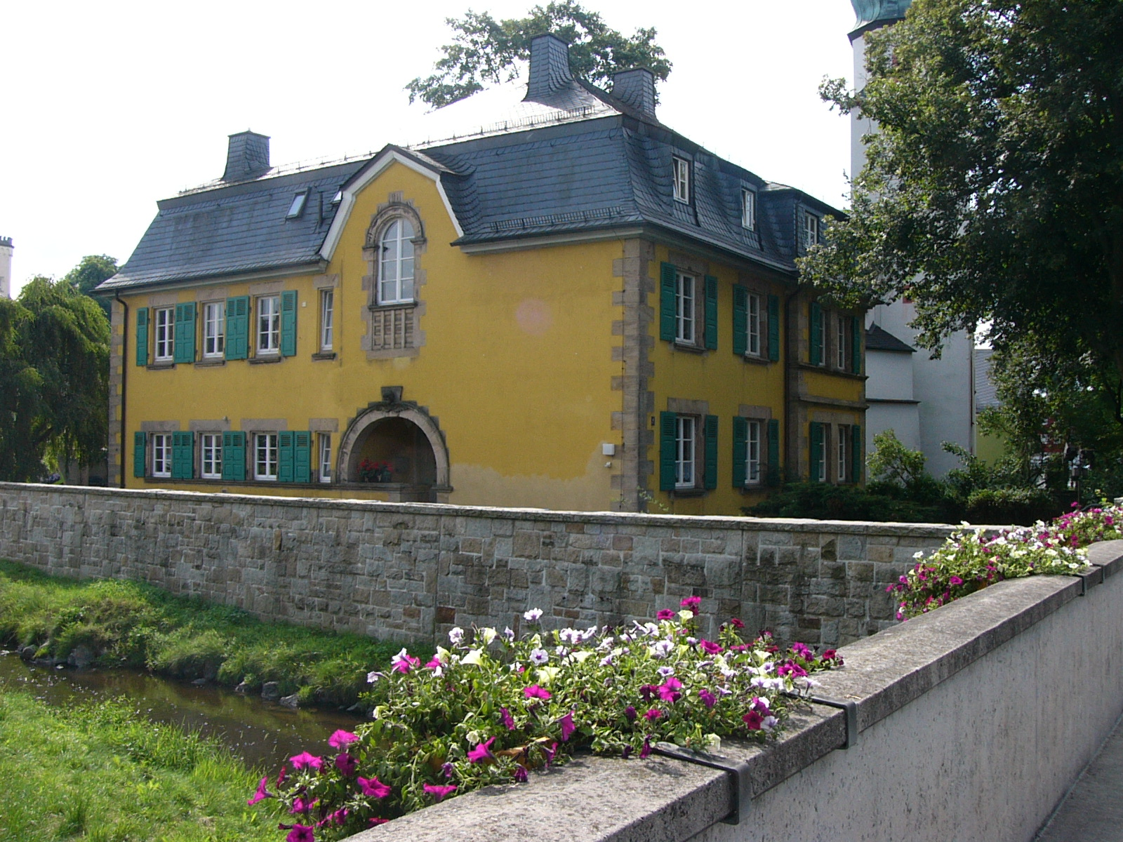 Straßenansichten von Oberkotzau